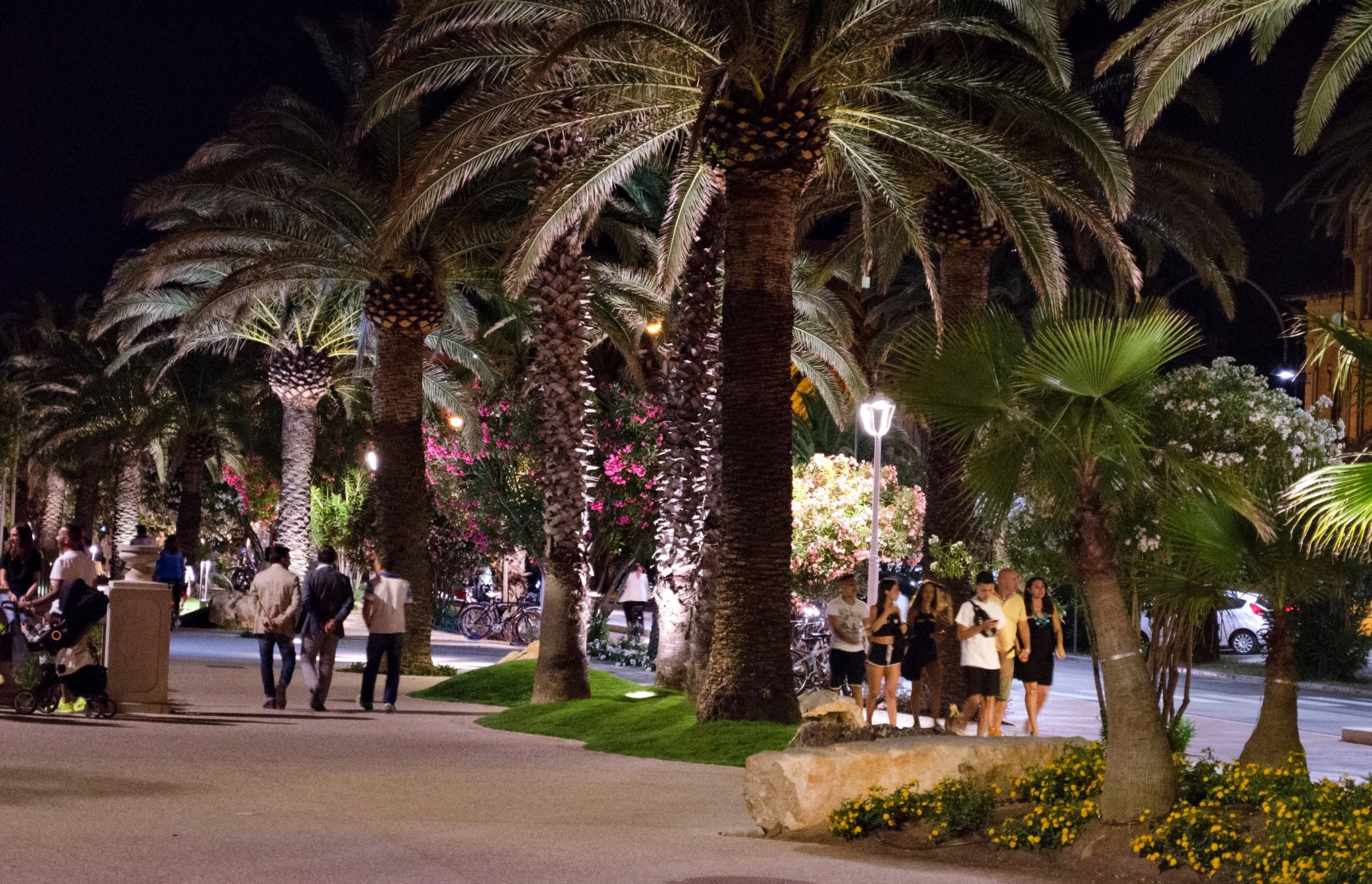 Lungomare Nord di San Benedetto del Tronto